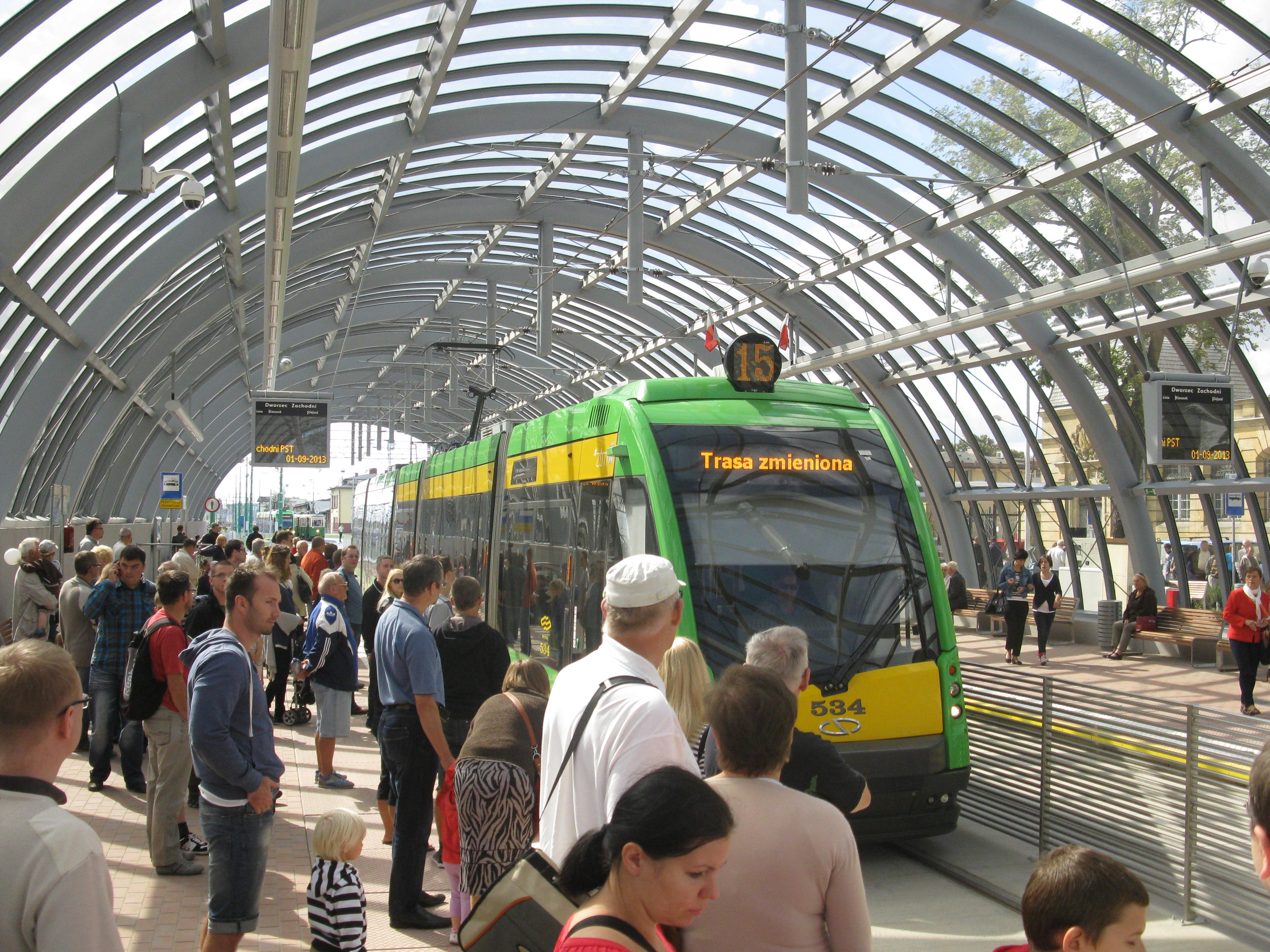 Stacja PST - Dworzec Zachodni, Solaris Tramino